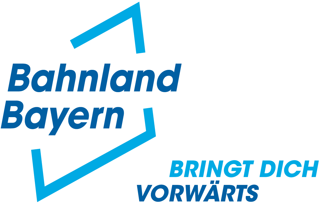 Logo Bahnland Bayern 2018